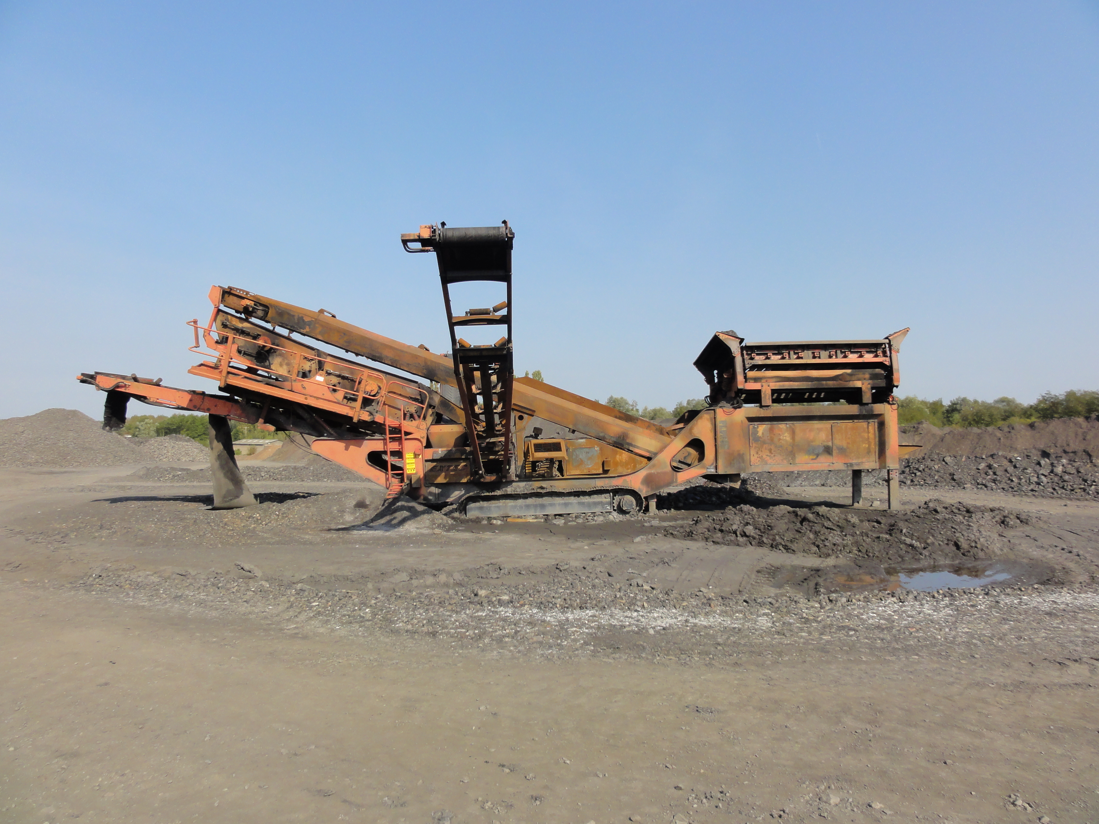 Terrils nos 201 et 202 respectivement dénommés Cuvinot et Cuvinot Ouest, Fosse Cuvinot de la Compagnie des mines d'Anzin, Onnaing, Nord, Nord-Pas-de-Calais, France.